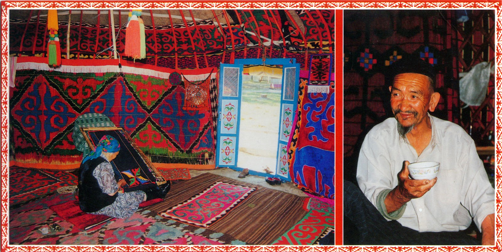 Kırgız çadırı, alaca keçeden bir yurt.